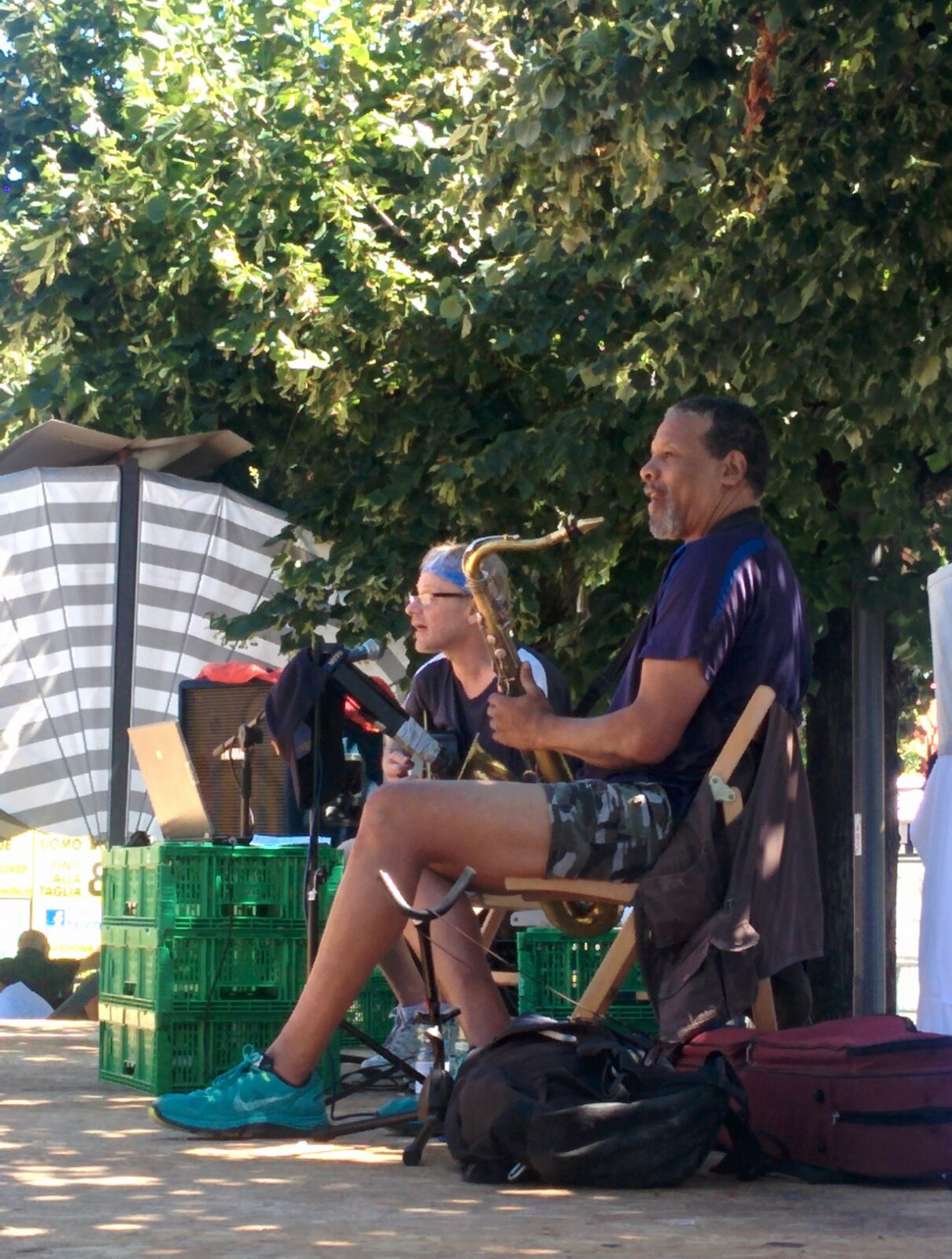 L'ex cestista ed allenatore di pallacanestro statunitense Charlie Yelverton